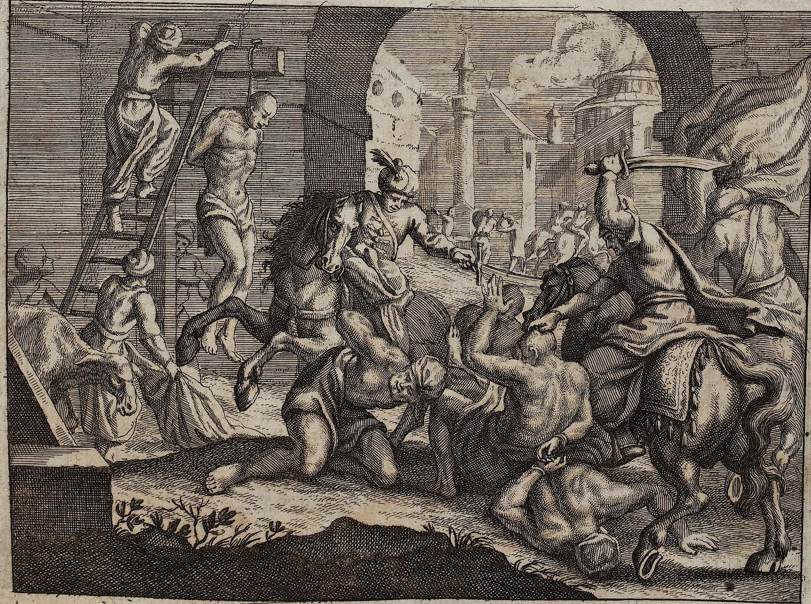 Rycaut, Paul; Sagredo, Giovanni Die Neu-eröffnete Ottomannische Pforte: Bestehend: Erstlichen, In einer ... Beschreibung Deß gantzen Türckischen Staats- und Gottesdiensts (Band 1) — Augsburg, 1694, p.278